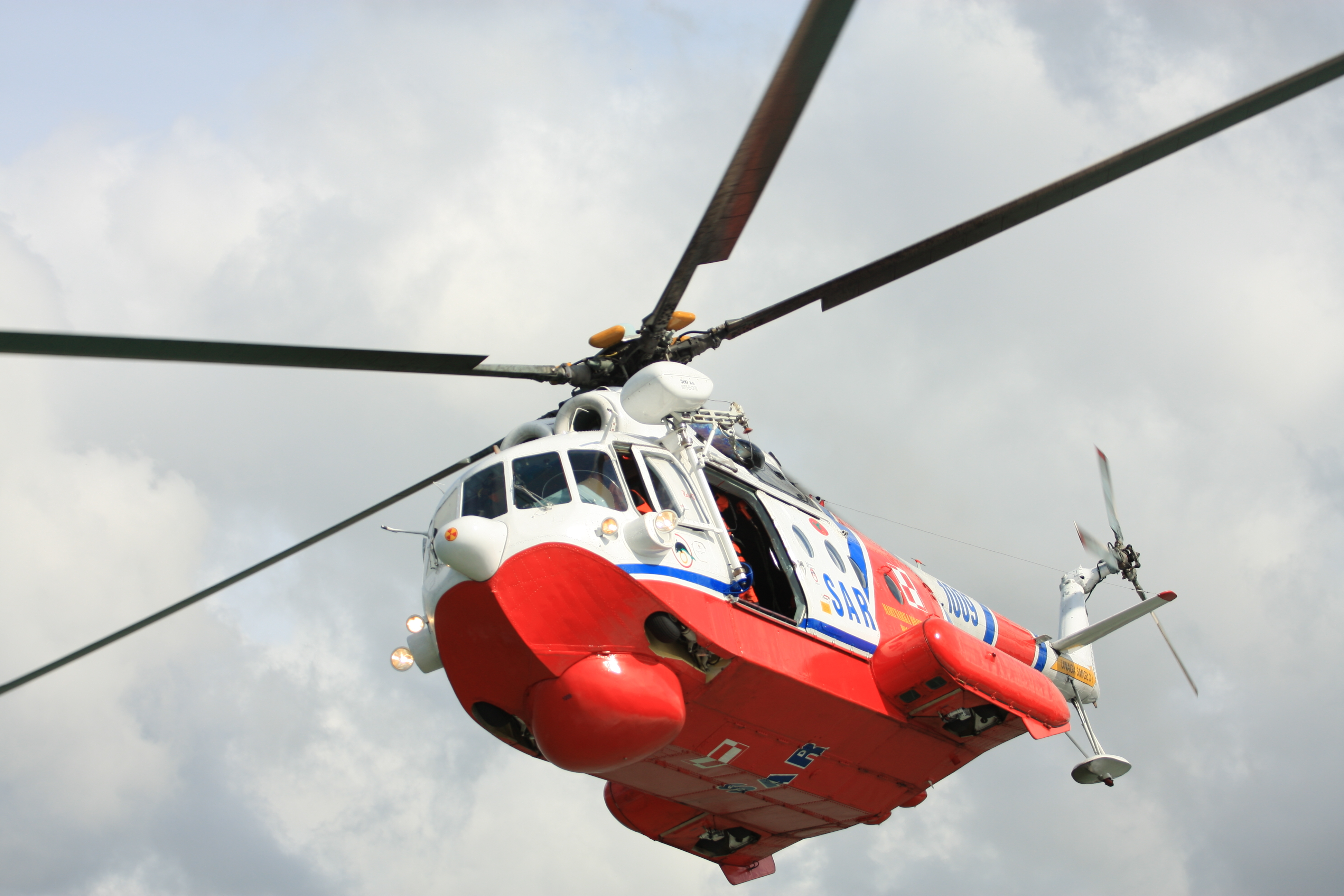 I Morskie Pokazy Lotnicze - Darłowo 2012